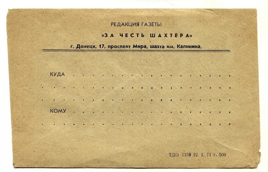 Пример служебных конвертов СССР: не прошедший почту местный служебный конверт газеты «За честь шахтёра» (Донецк, 1971).